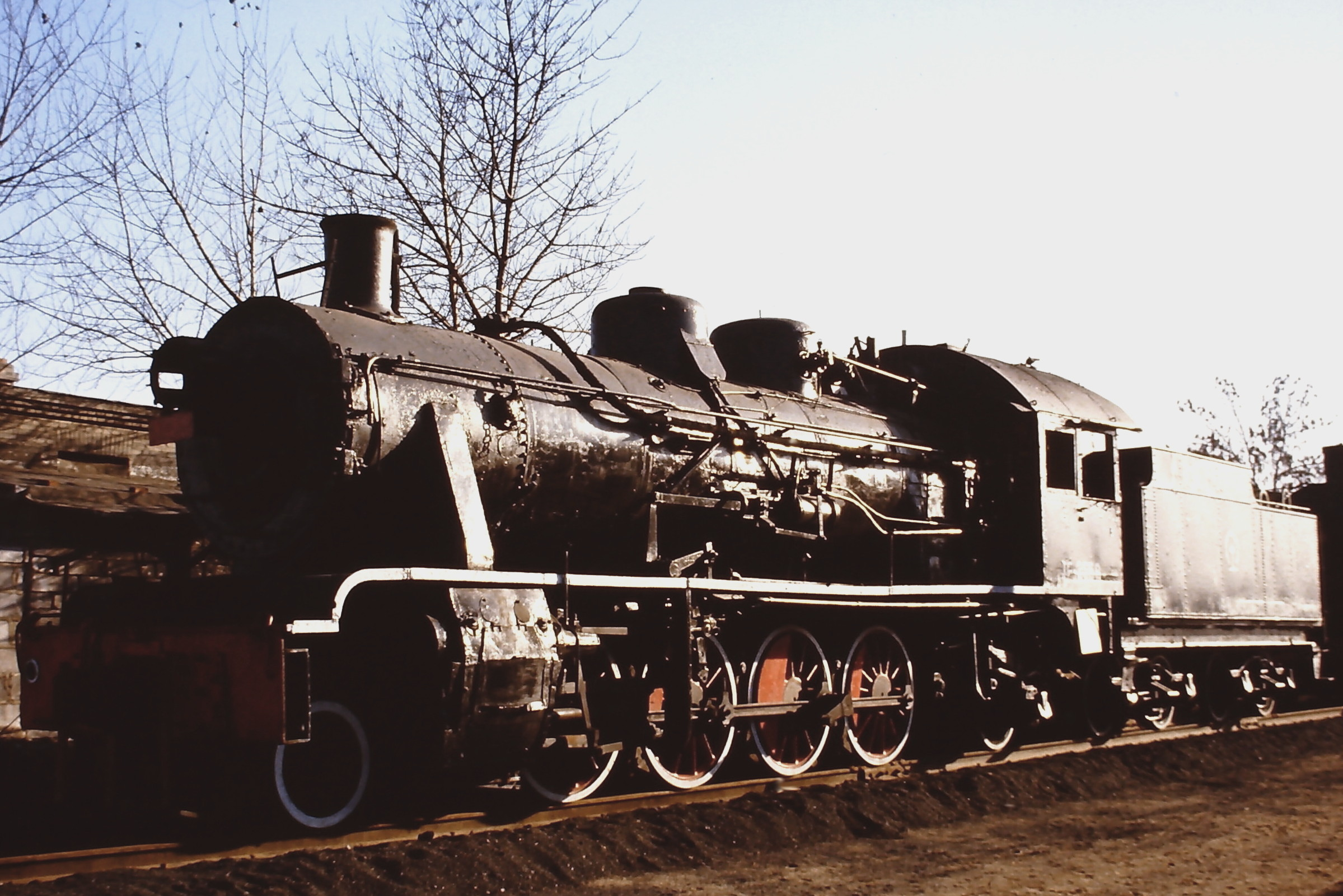 CNR JF3-2558 (Dampflokomotivmuseum Shenyang)